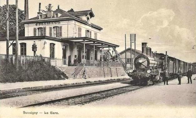 Güterzug im Bahnhof Bussigny mit Lokomotive B 3/4, gebaut von der Schweizerischen Lokomotiv- und Maschinenfabrik (SLM) in Winterthur für die Jura-Simplon-Bahn